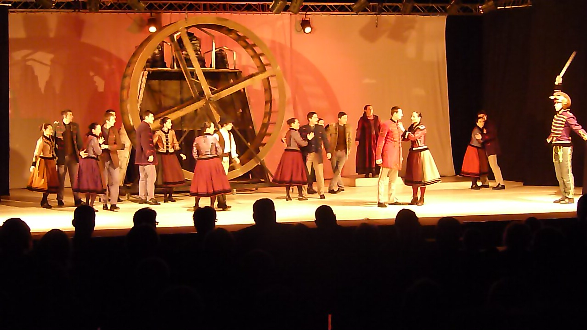 Live on the 14th of February, 2015. Budapest, Várkert Bazár. Gábor Áron - Háromszék Dance Ensemble. Director and choreographer: Orza Călin. II. Budapest Székely Ball. A felvételek 2015. február 14-én készültek Budapesten, a Várkert Bazárban. II. Budapesti Székely Bál. Gábor Áron táncdráma - Háromszék Táncegyüttes.